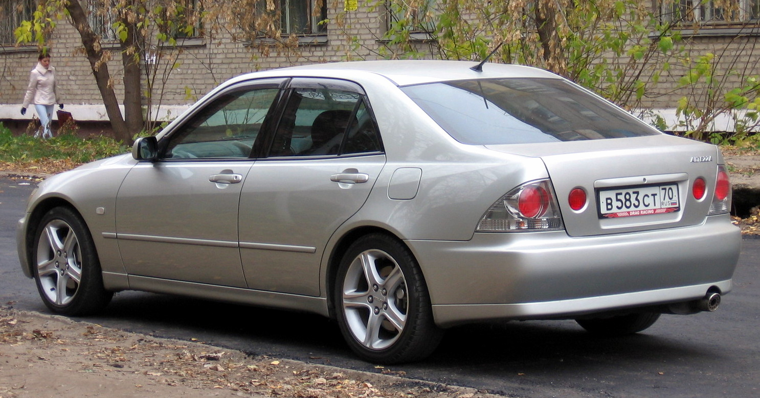 Photo taken in Tomsk, Russia